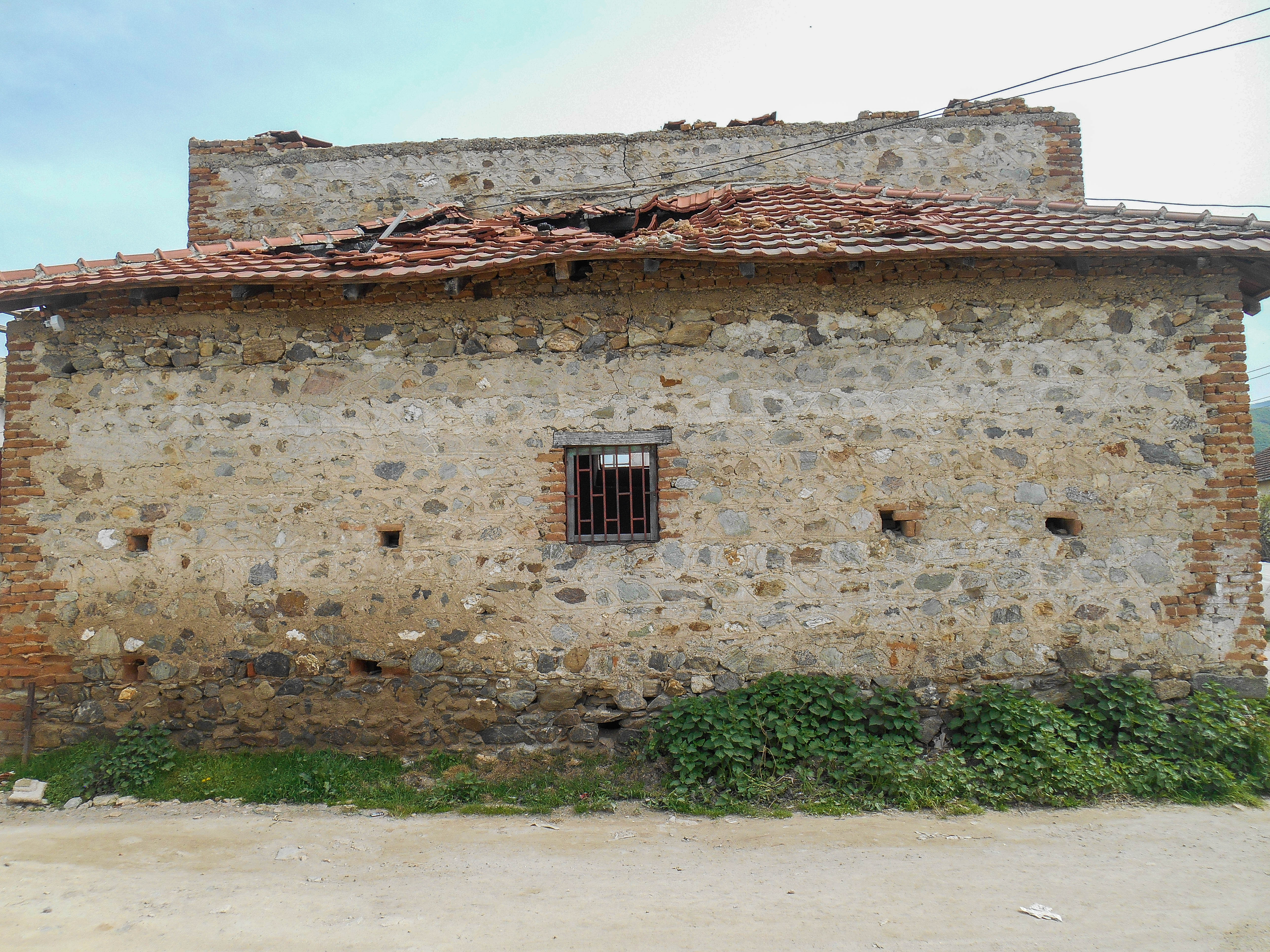 Дом на културата во селото Куклиш, Општина Струмица